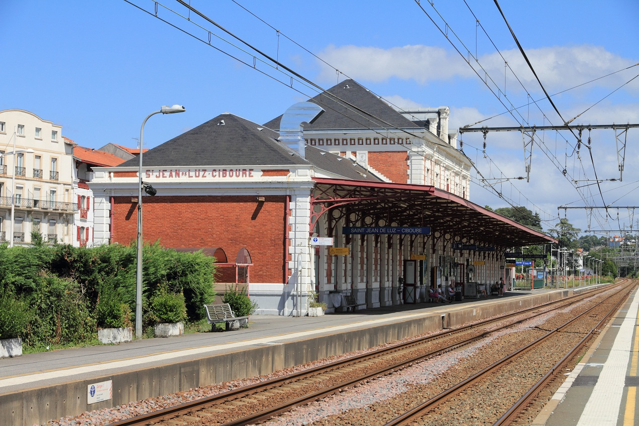 Vue du bâtiment voyageurs de la gare de Saint-Jean-de-Luz - Ciboure en août 2012, Aquitaine, France.